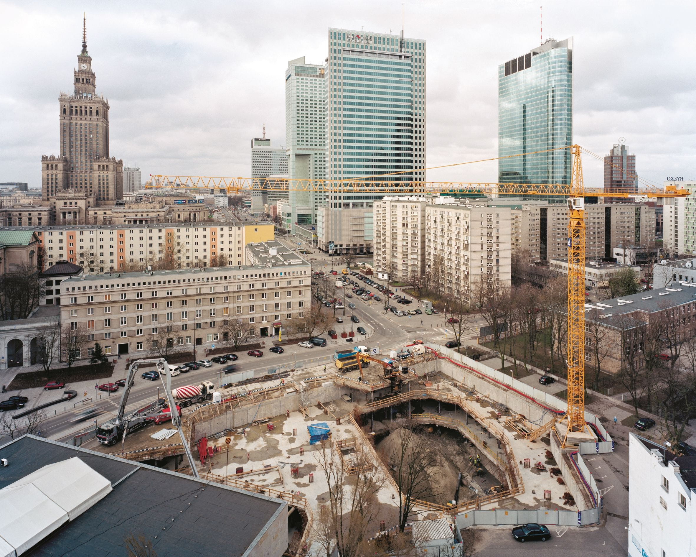 Elżbieta Janicka, Wojciech Wilczyk - Inne Miasto. Małe getto. Widok z Grzybowskiej 5 w kierunku południowo-zachodnim — 8 kwietnia 2011